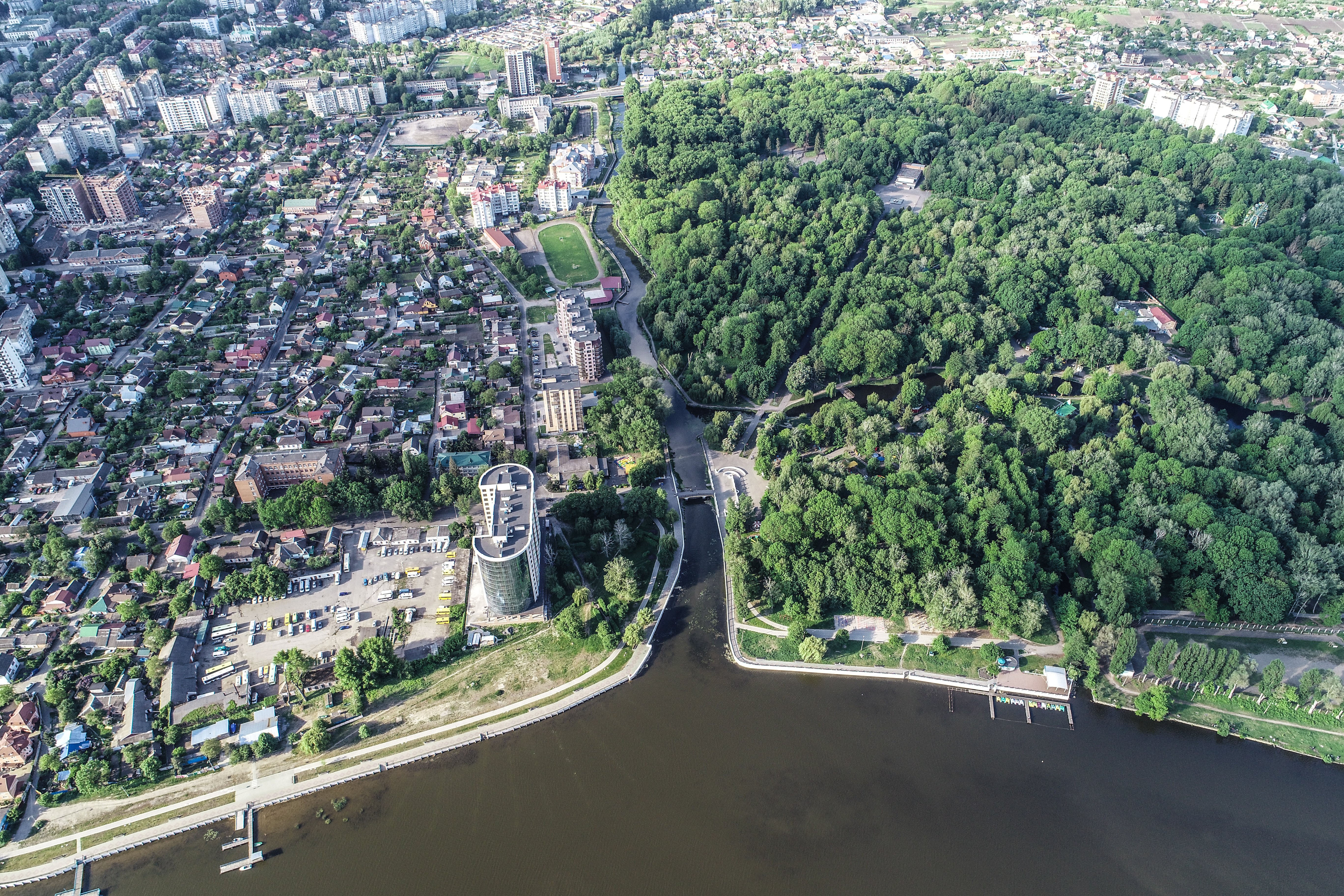 Парк ім.. М. Чекмана, м. Хмельницький, по вул. Котовського